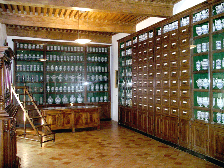 Schrank und Apothekergefäße in der Apotheke des Krankenhauses von Pont-Saint-Esprit, Languedoc-Roussillon, Frankreich.